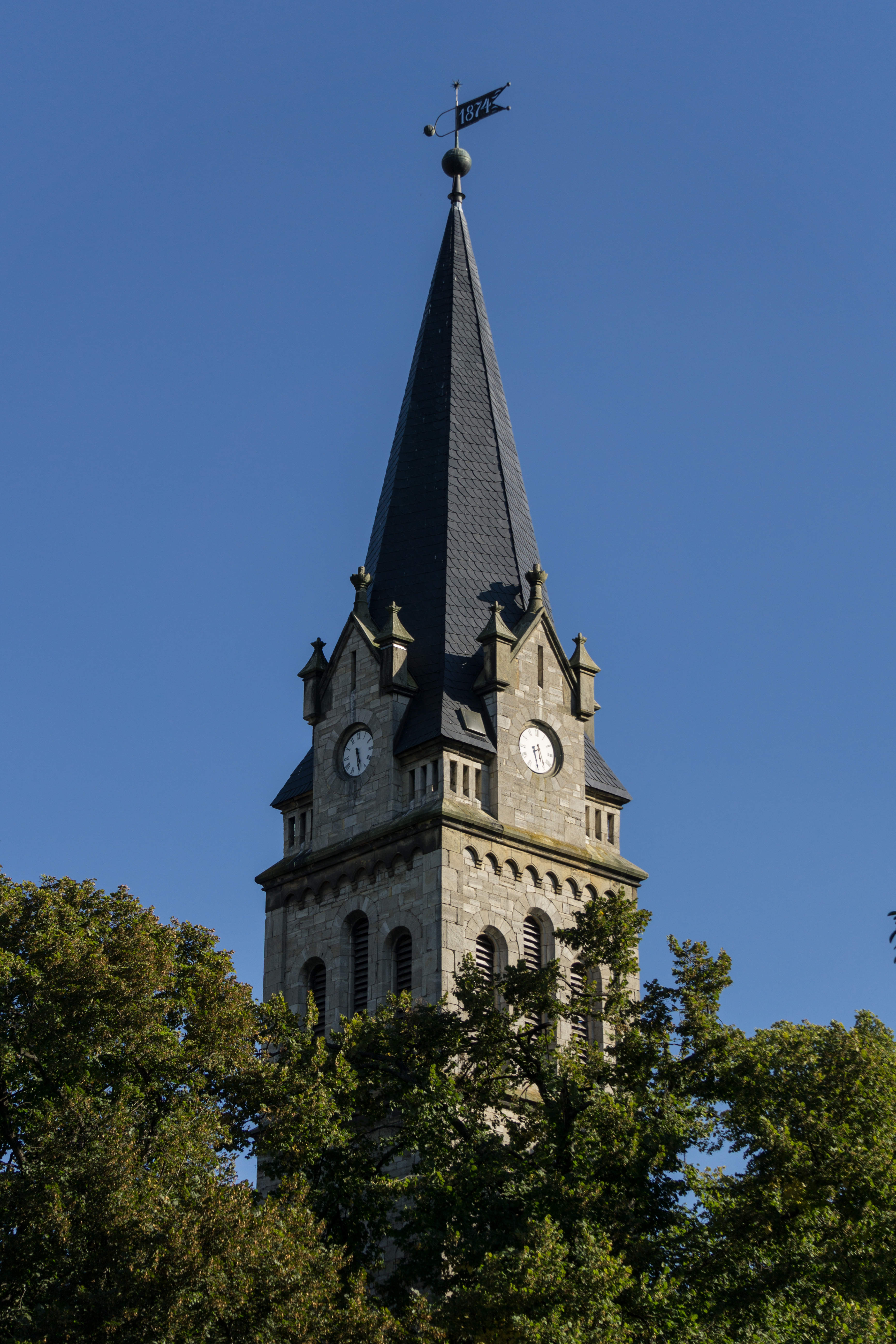 Hakeborn - Kirche St.Alexander